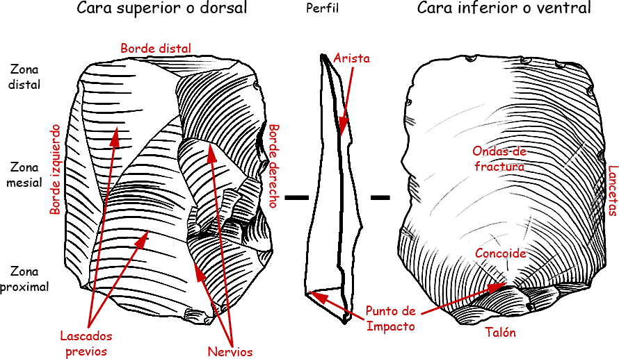 Elementos principales para la descripción de una lasca de la Edad de Piedra